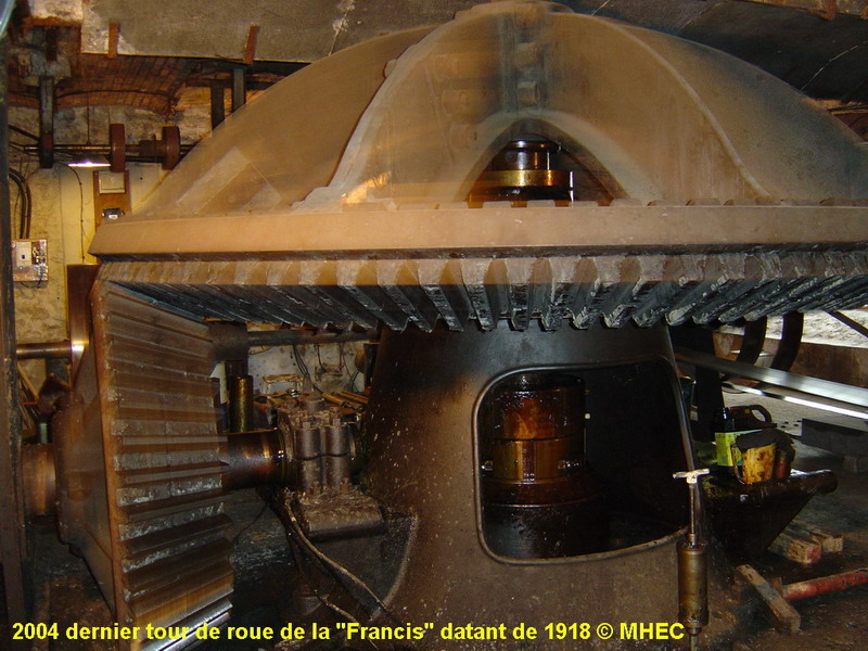 Turbine Francis de type Singrun (118 kW ) installée dans le moulin de Chappes (10260) en 1918